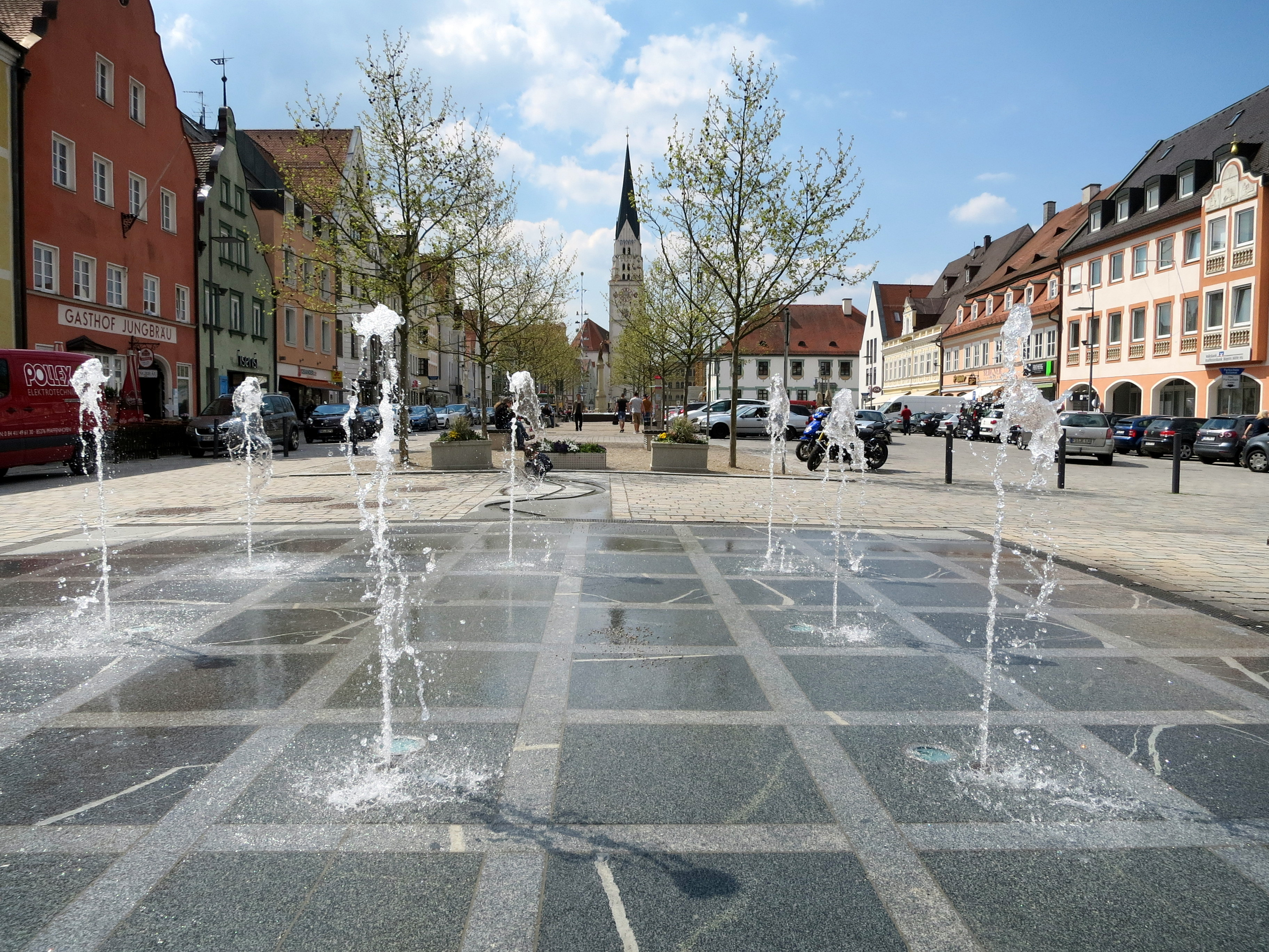 Der Pfaffenhofener Hauptplatz hat in der autofreien Zone einen Springbrunnen. Der gesamte Platz steht unter Ensembleschutz.